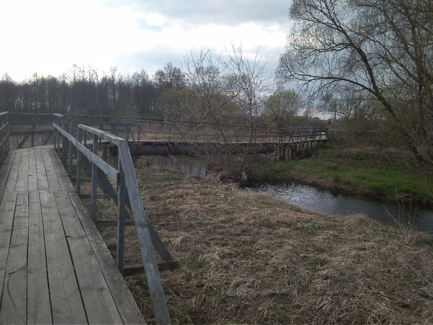 мост через реку Перетуть между аг. Негорелое и д. Чурилы